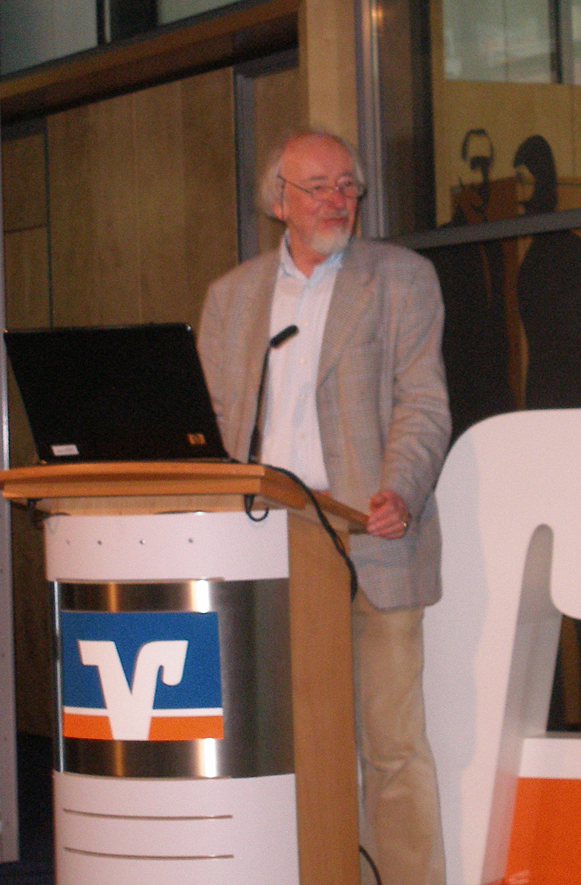 Volker Honemann bei Vortrag 2013 in Bautzen